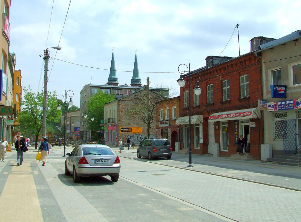 Deptak w Pruszkowie